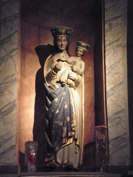 Statue de Notre-Dame de Charné, à Ernée (53).